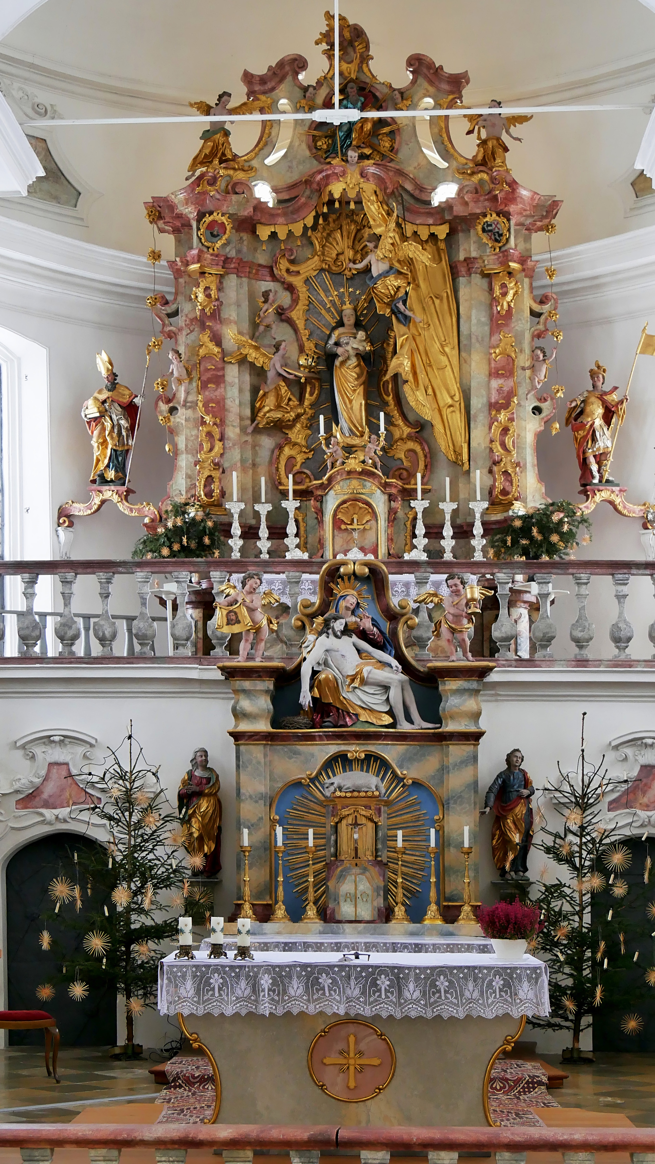 Wallfahrskapelle Maria Schnee in Lehenbühl bei Legau - Hochaltar mit Gnadenbild